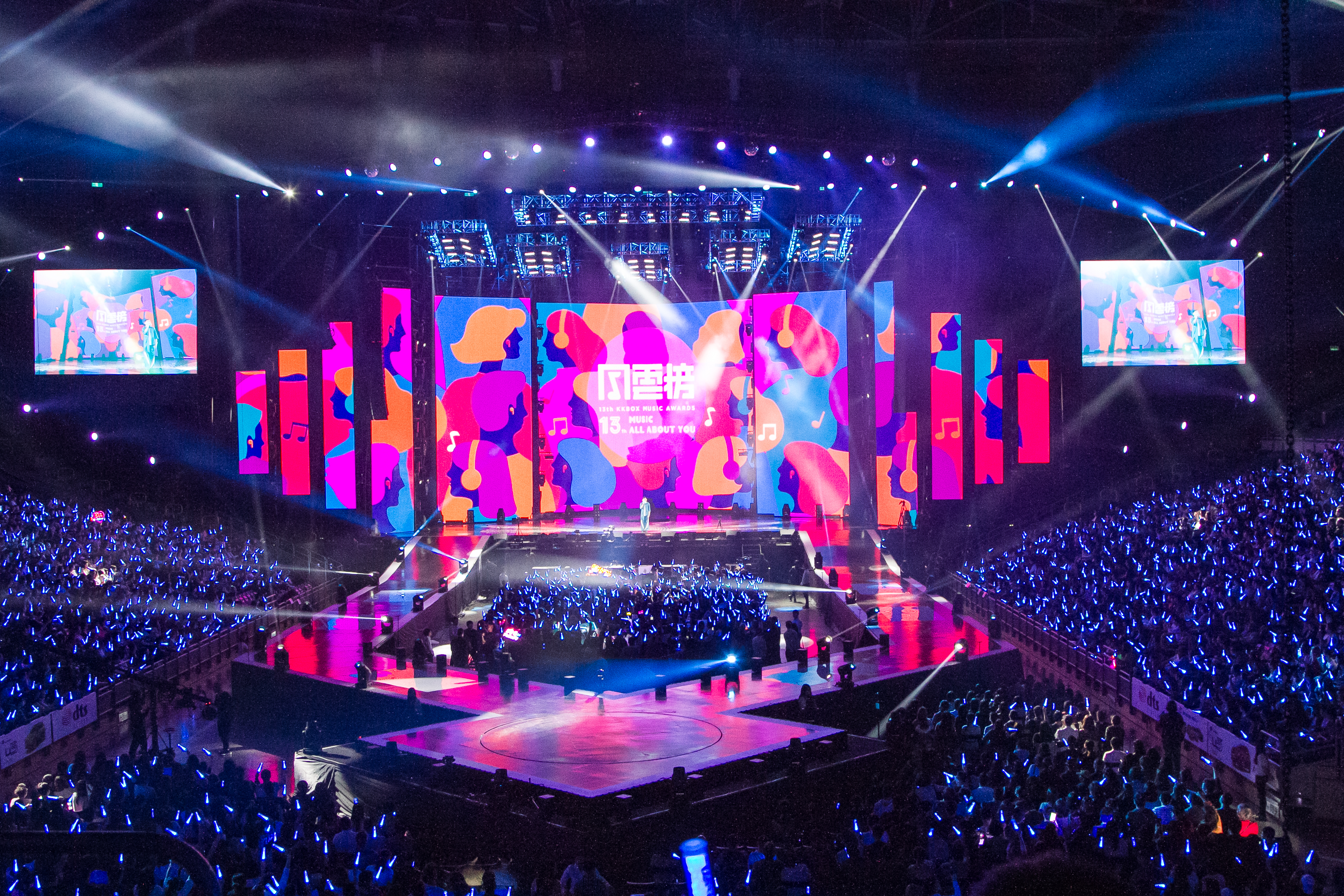 中文（台灣）: 第十三屆KKBOX風雲榜－高雄巨蛋